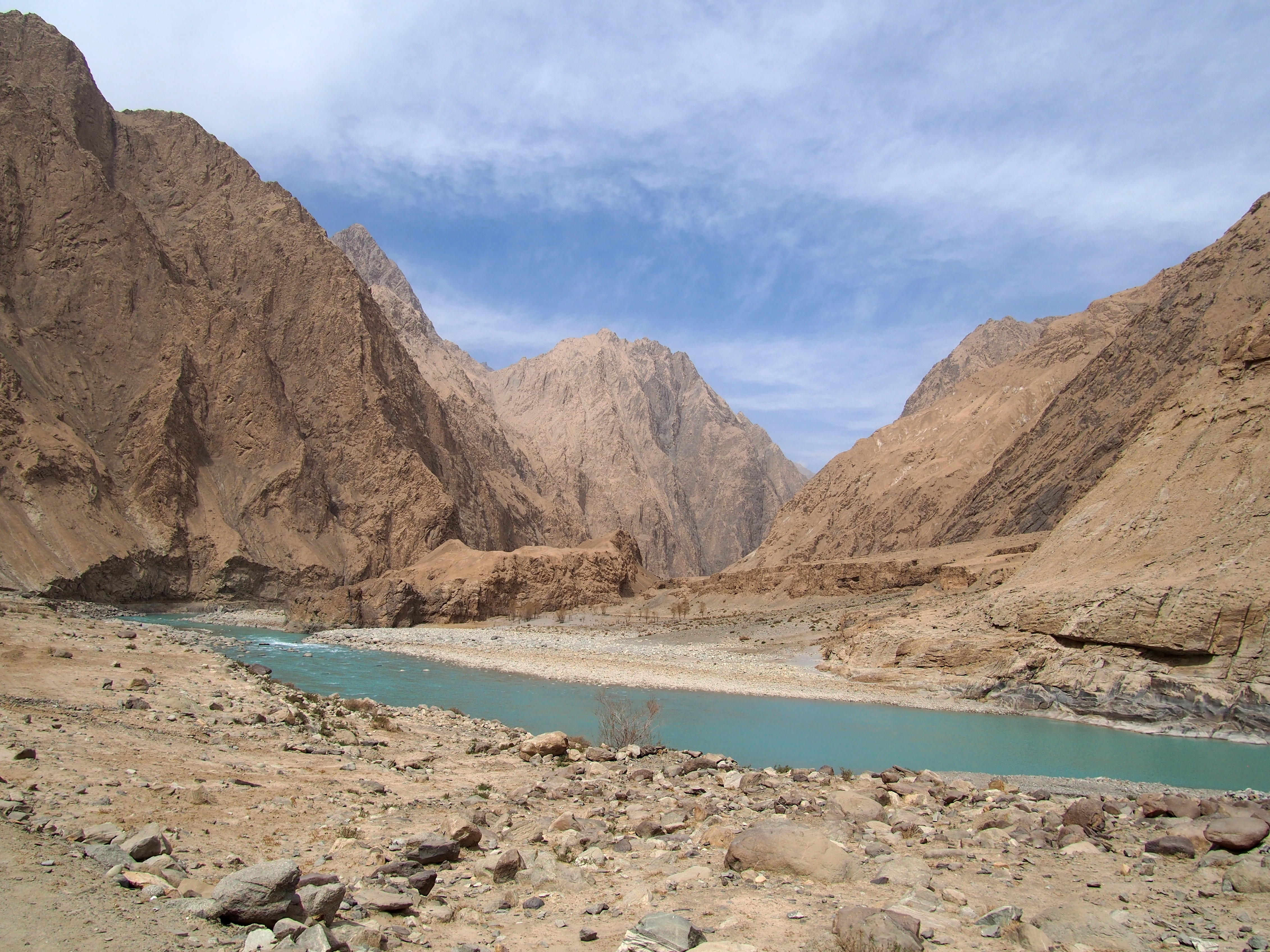 叶尔羌河 - Yarkand River - 2015.04